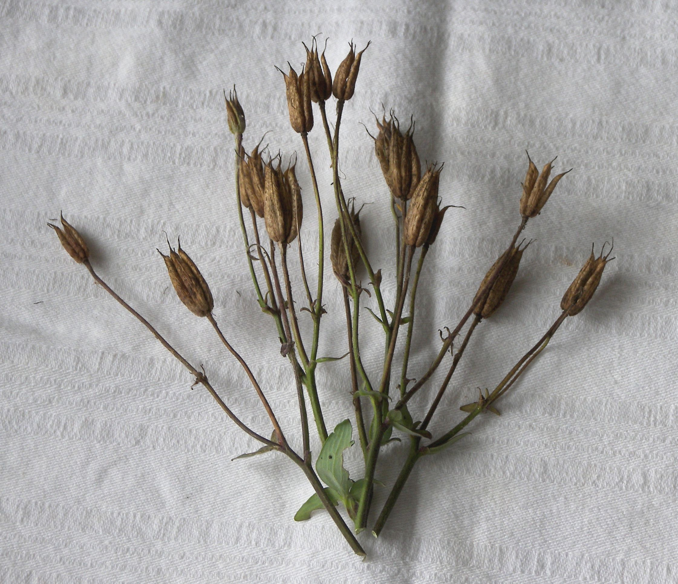 Samenkapseln der Akelei